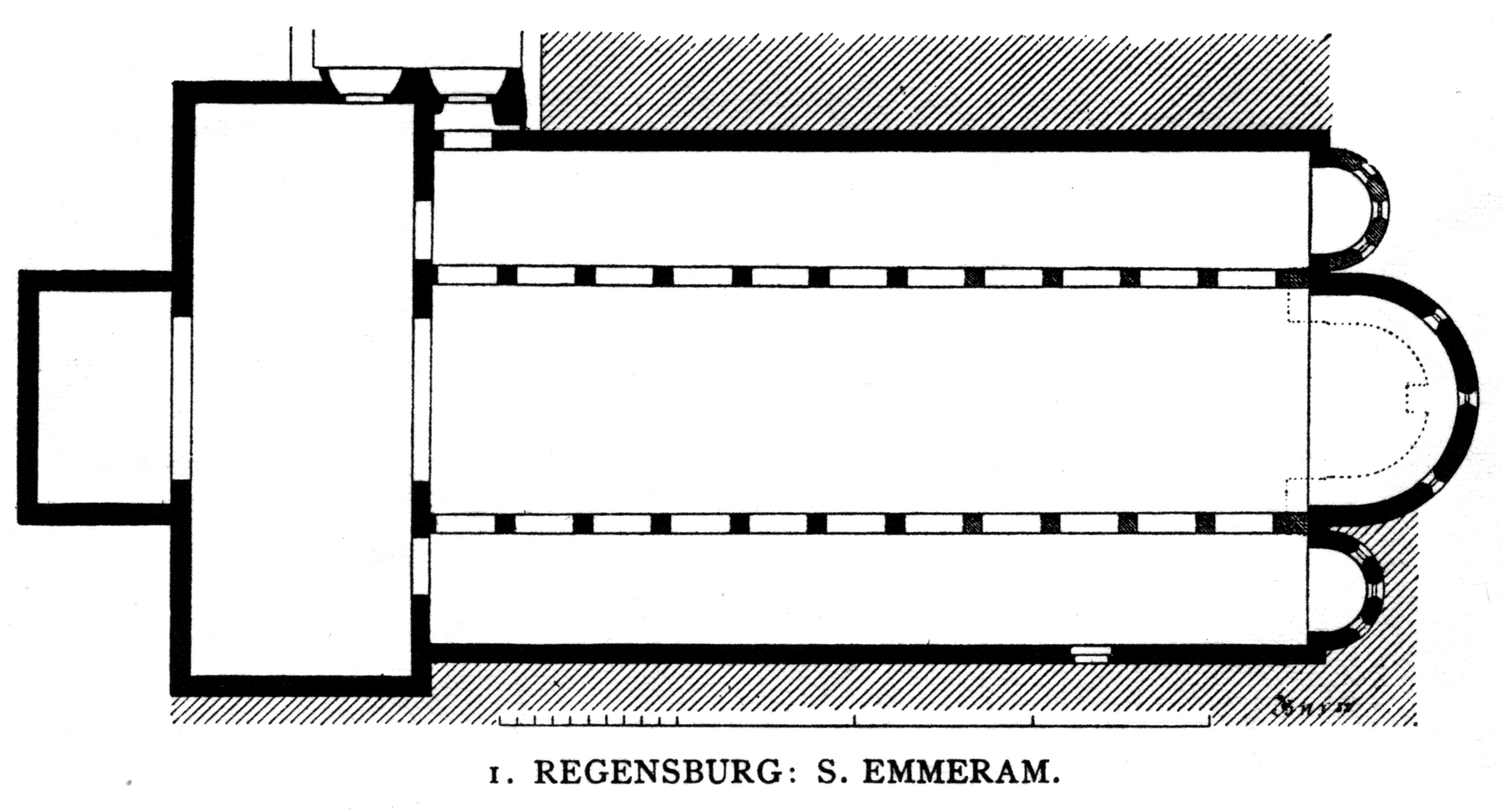 Regensburg, St. Emmeram, floor plan.